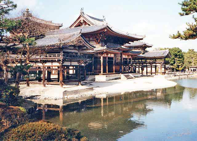 El Recibidor del Fénix en Byodoin Byodoin Buddhist Temple Ho-o Phoenix Hall Uji, Kyoto Kyoto prefecture Kansai Honshu Japan I took this photograph and contribute it to the public domain.